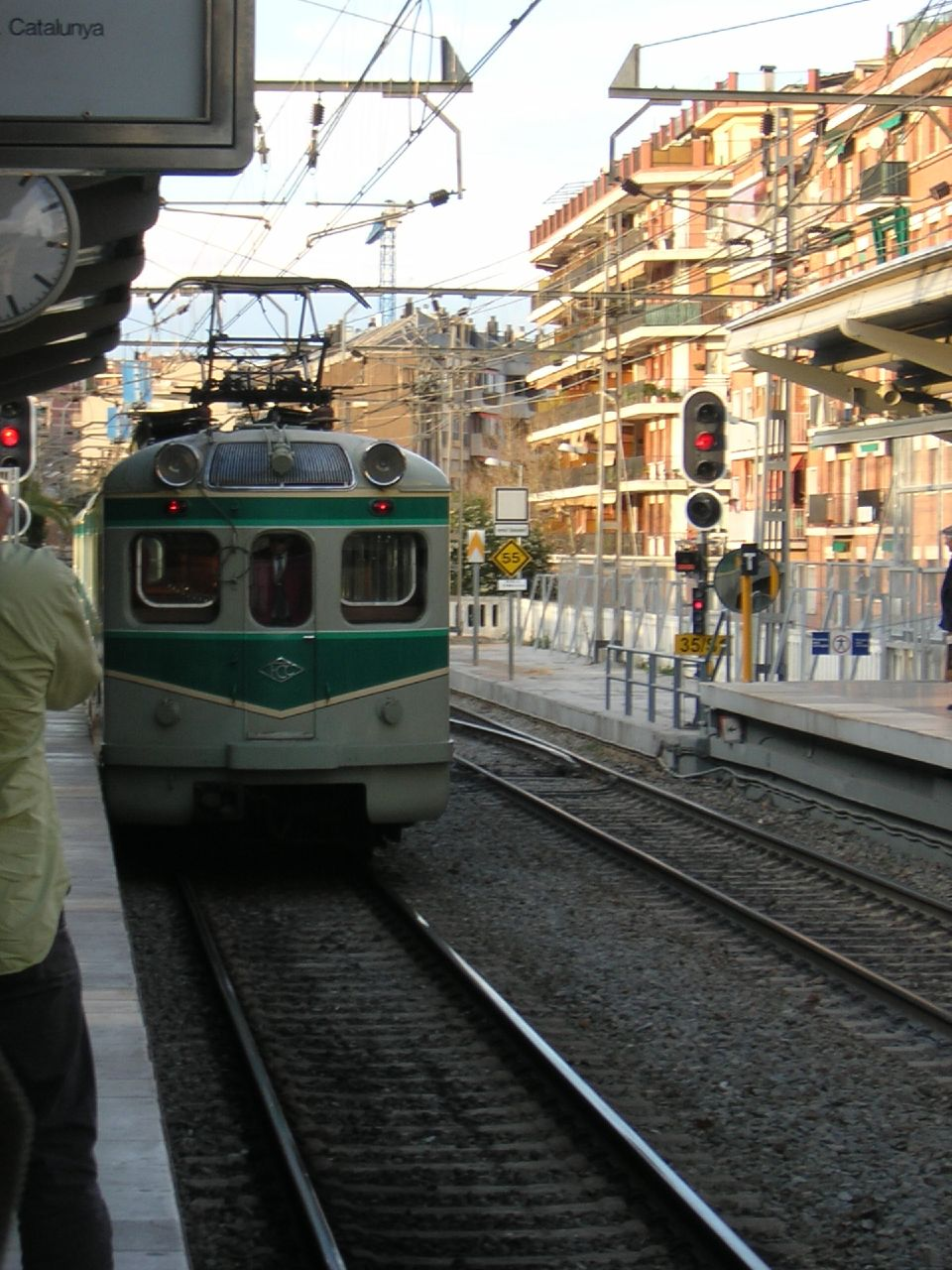 Granota (Unitat 400) a l'estació de Sant Cugat del Vallès : Viatge amb el tren "Brill". 90 aniversari FGC Estacio Sant Cugat del Valles Ferrocarrils de la Generalitat de Catalunya - Ferrocarrils de Catalunya